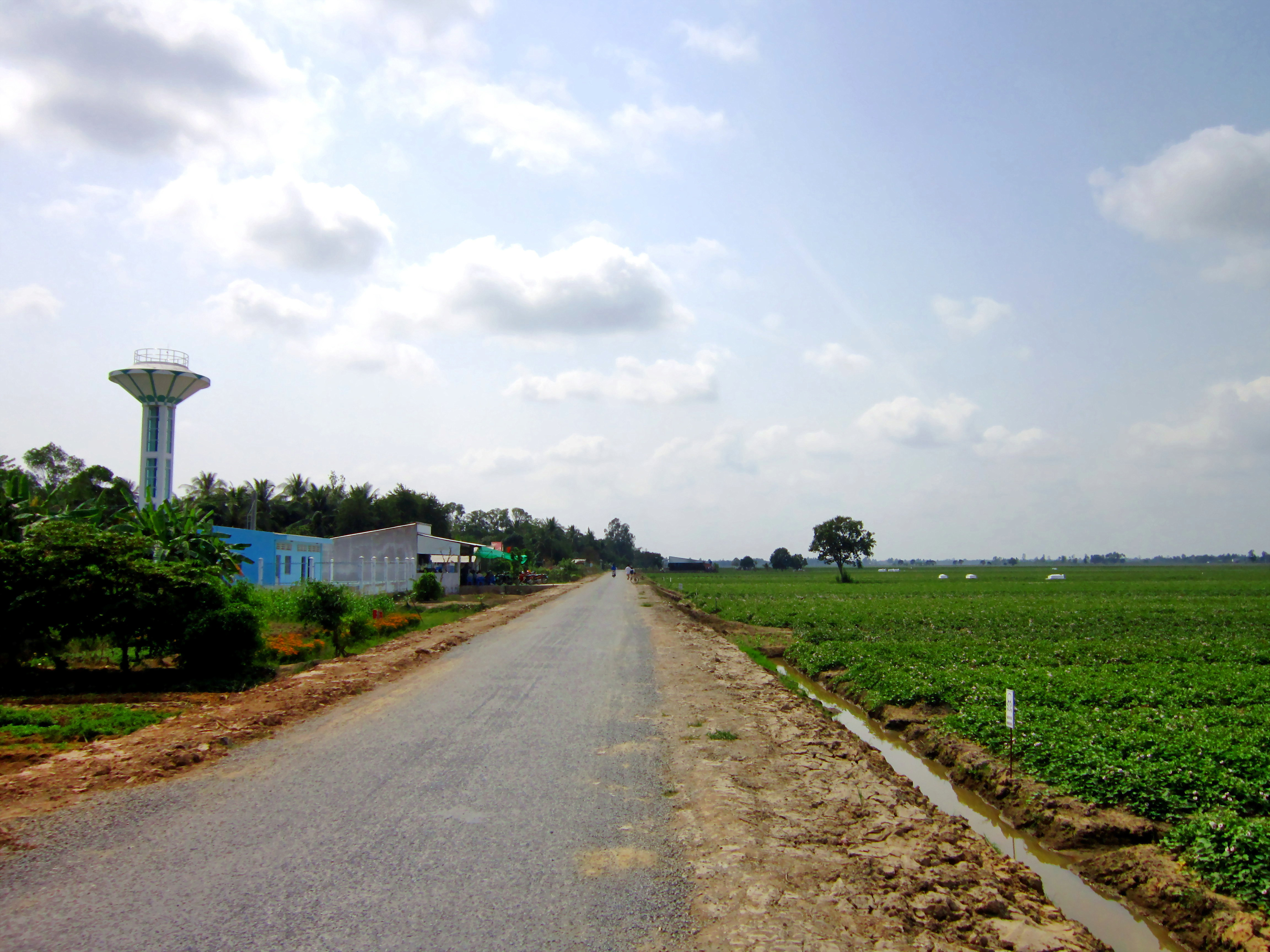 Một con đường trải nhựa băng qua vùng chuyên canh khoai lang tím Nhật ở huyện Bình Tân, tỉnh Vĩnh Long, Việt Nam.